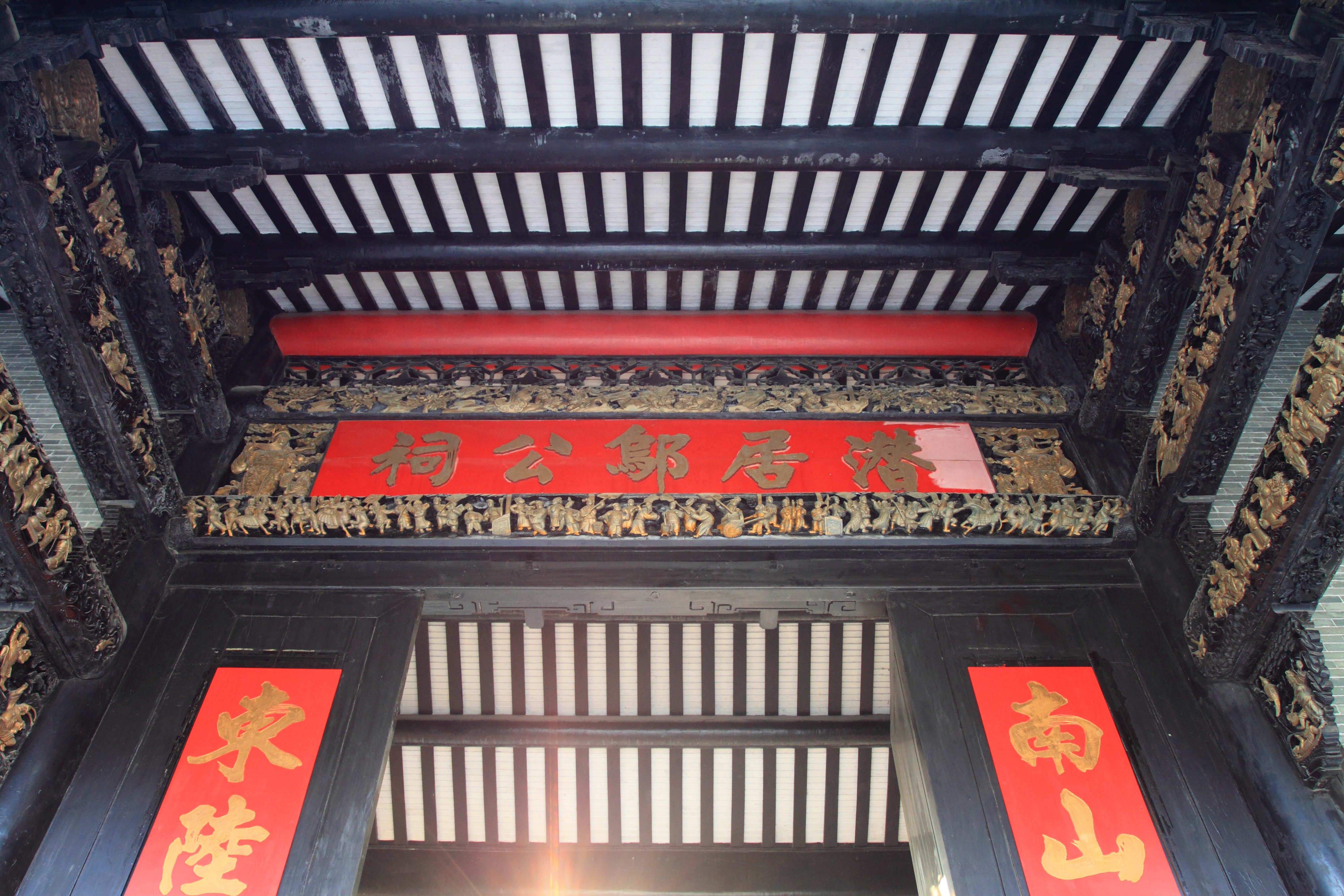 广州市番禺区南村镇余荫山房 -- 潜居邬公祠